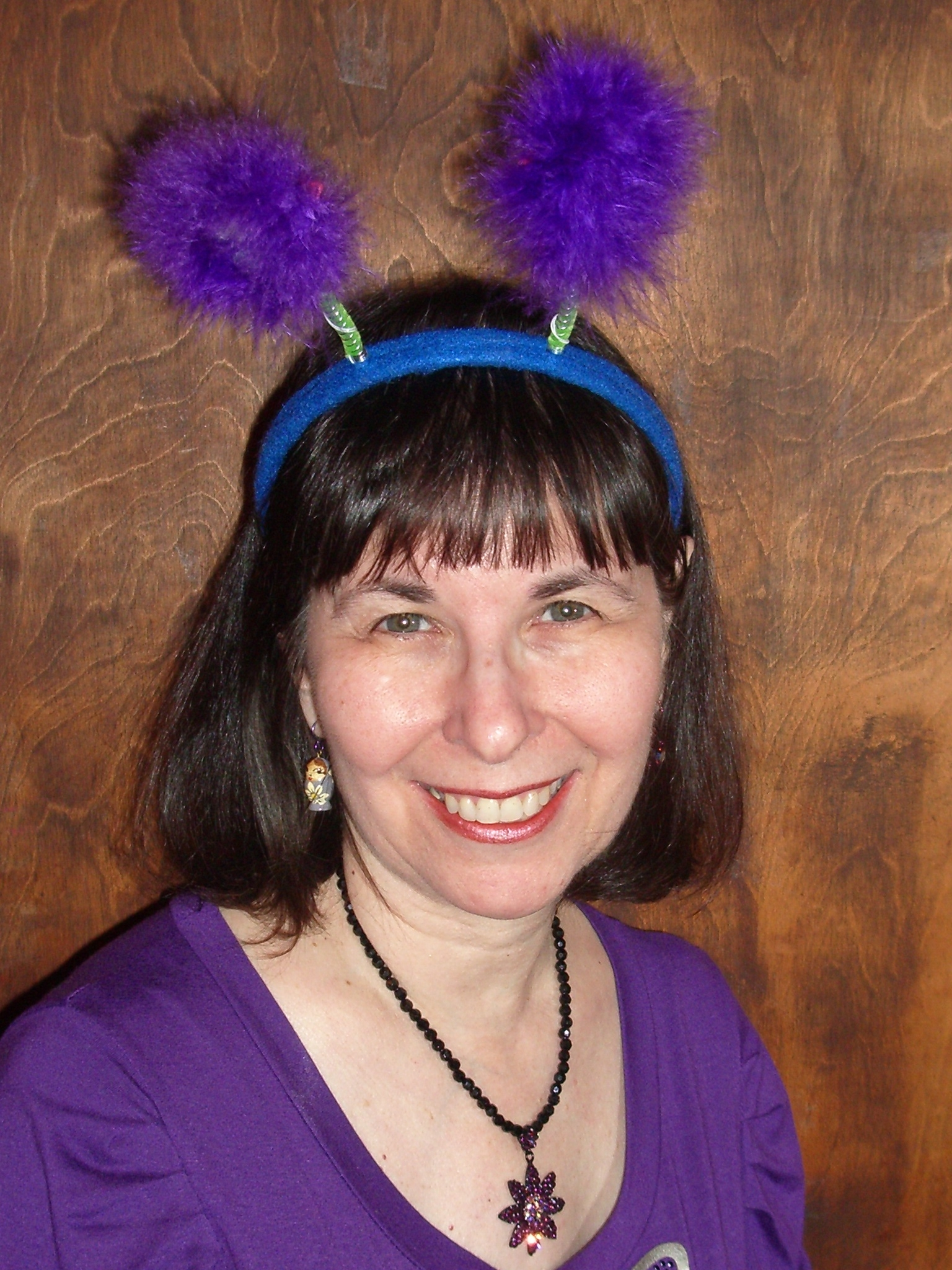 Deely bobbers